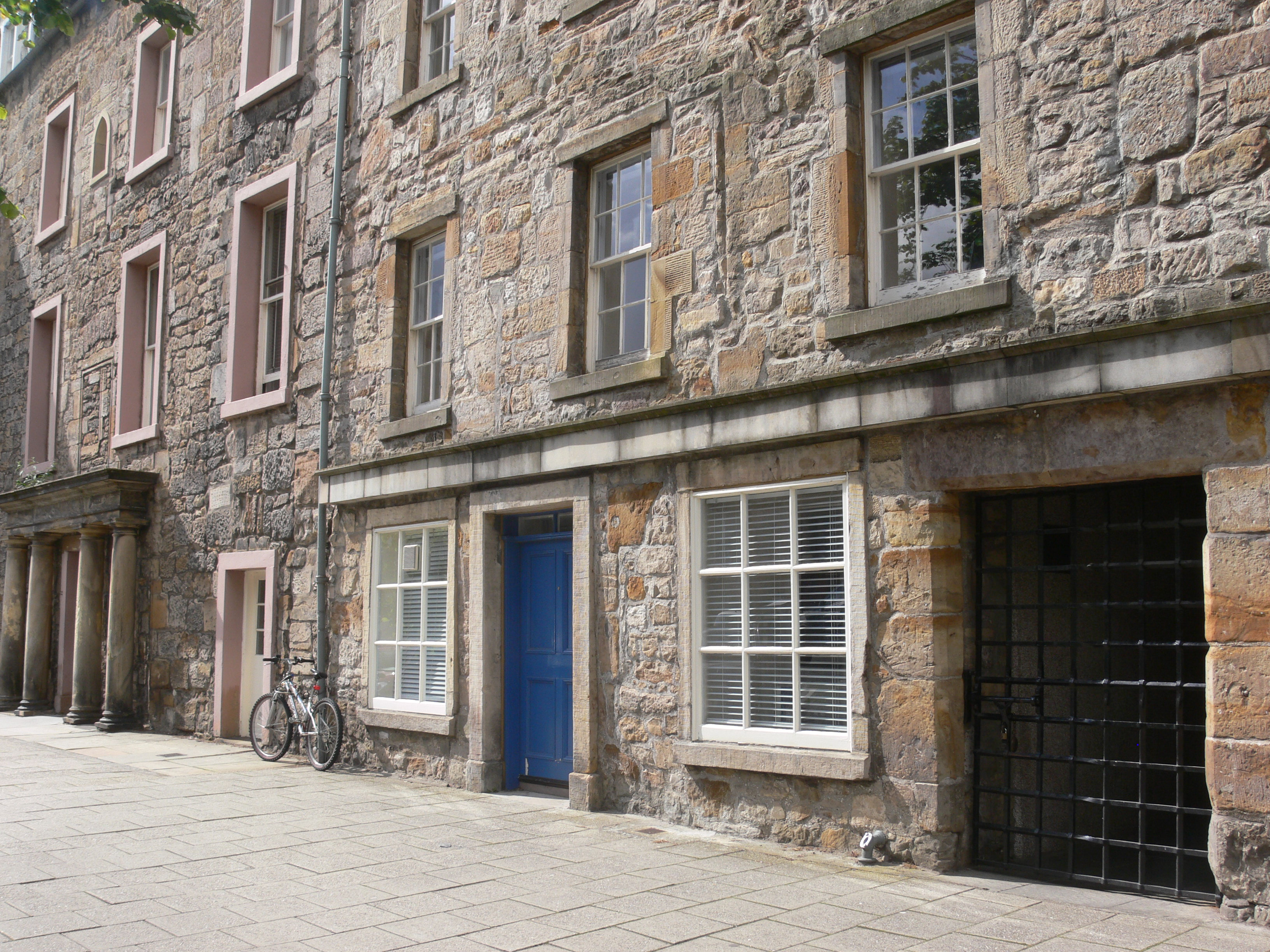 St Andrews - St John's House